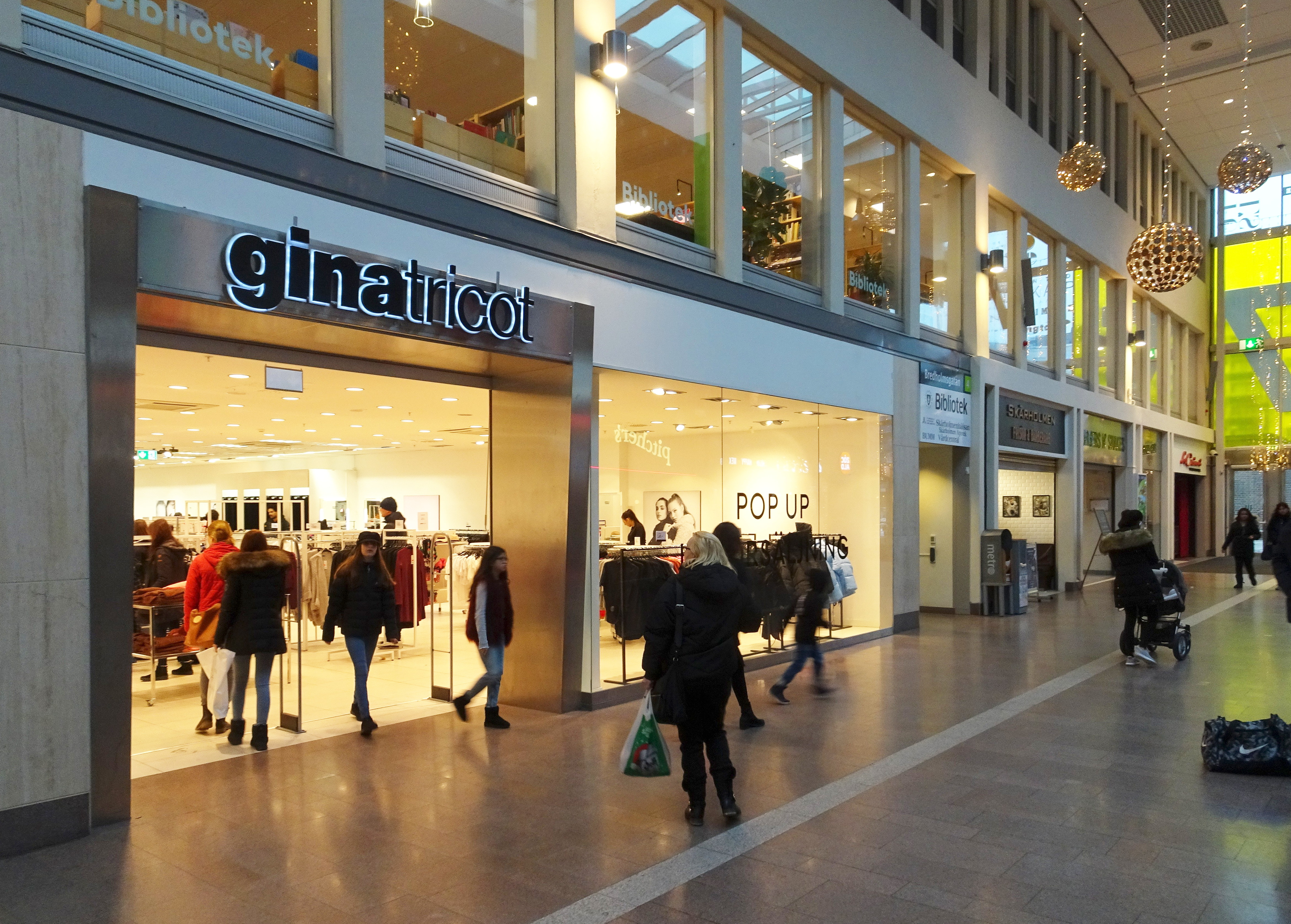 Skärholmens centrum, Bredholmsgången, här låg tidigare ingången till biografen Vågen. På våning 1 trappa ligger Skärholmens bibliotek.